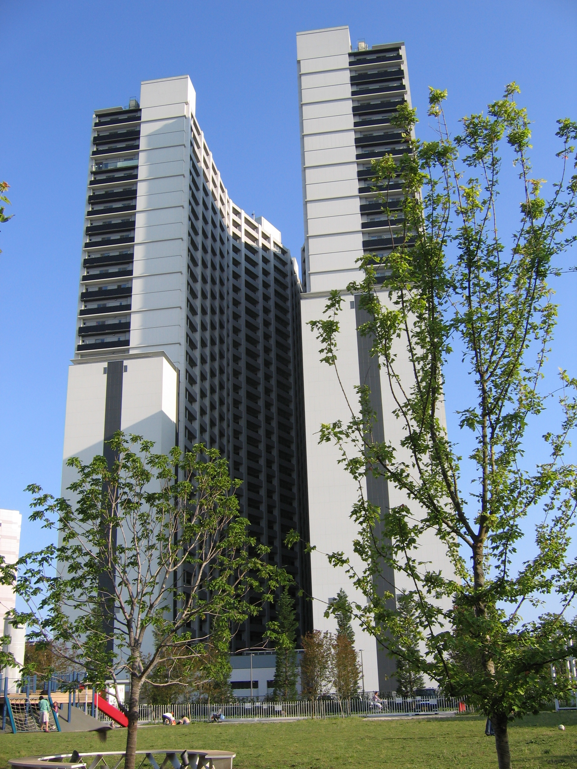 The Tower and Parks Denentoshi Mizonokuchi, Kawasaki, Kanagawa, Japan